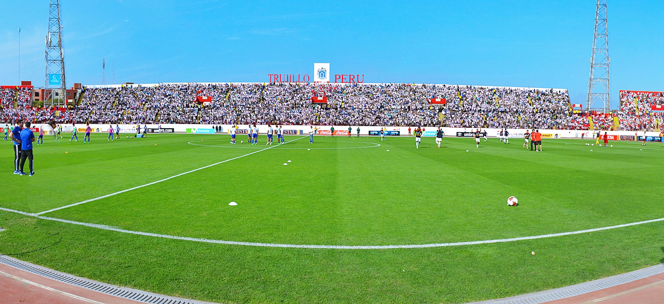 Estadio Mansiche Trujillo